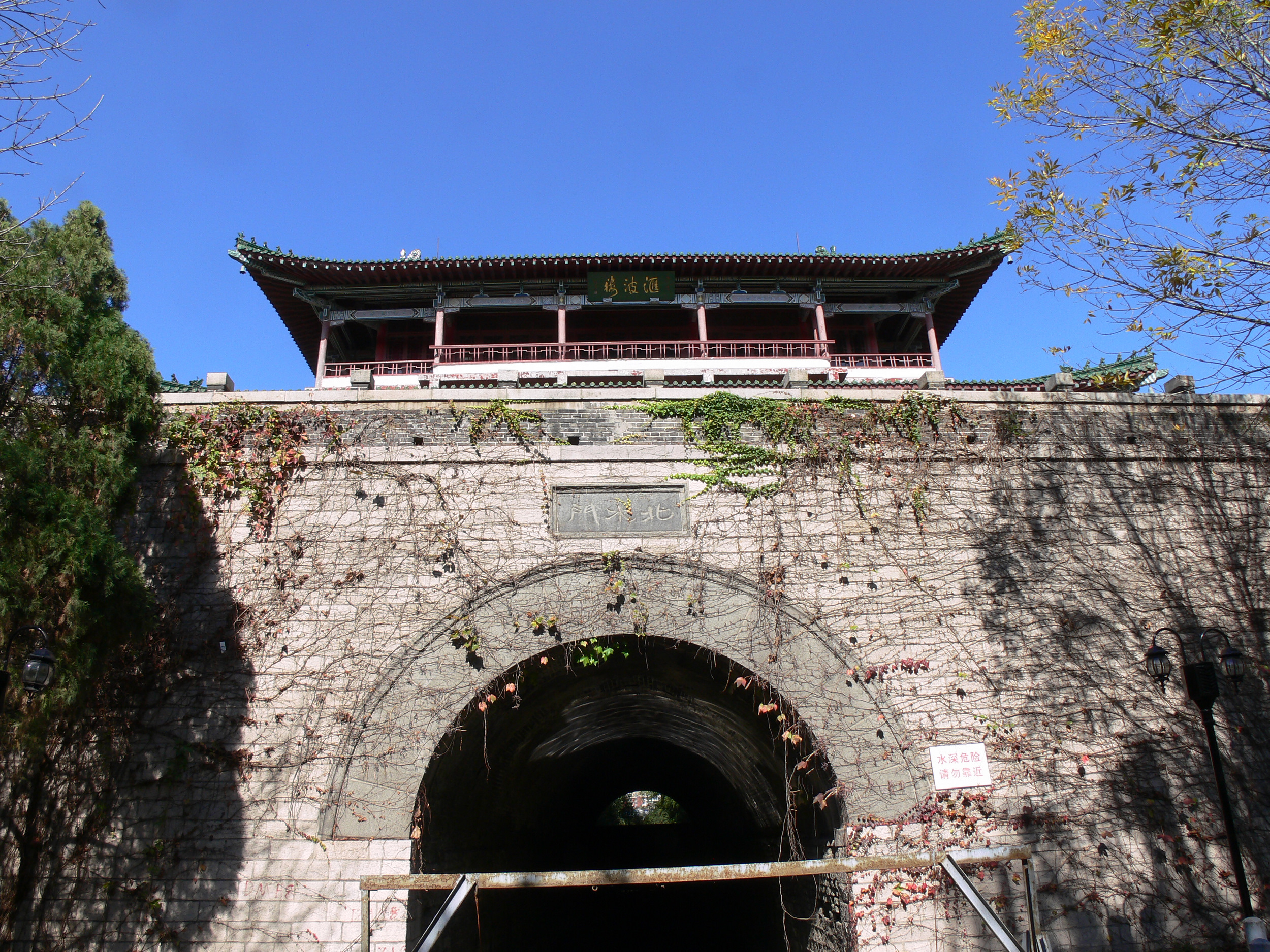 济南大明湖公园汇波楼